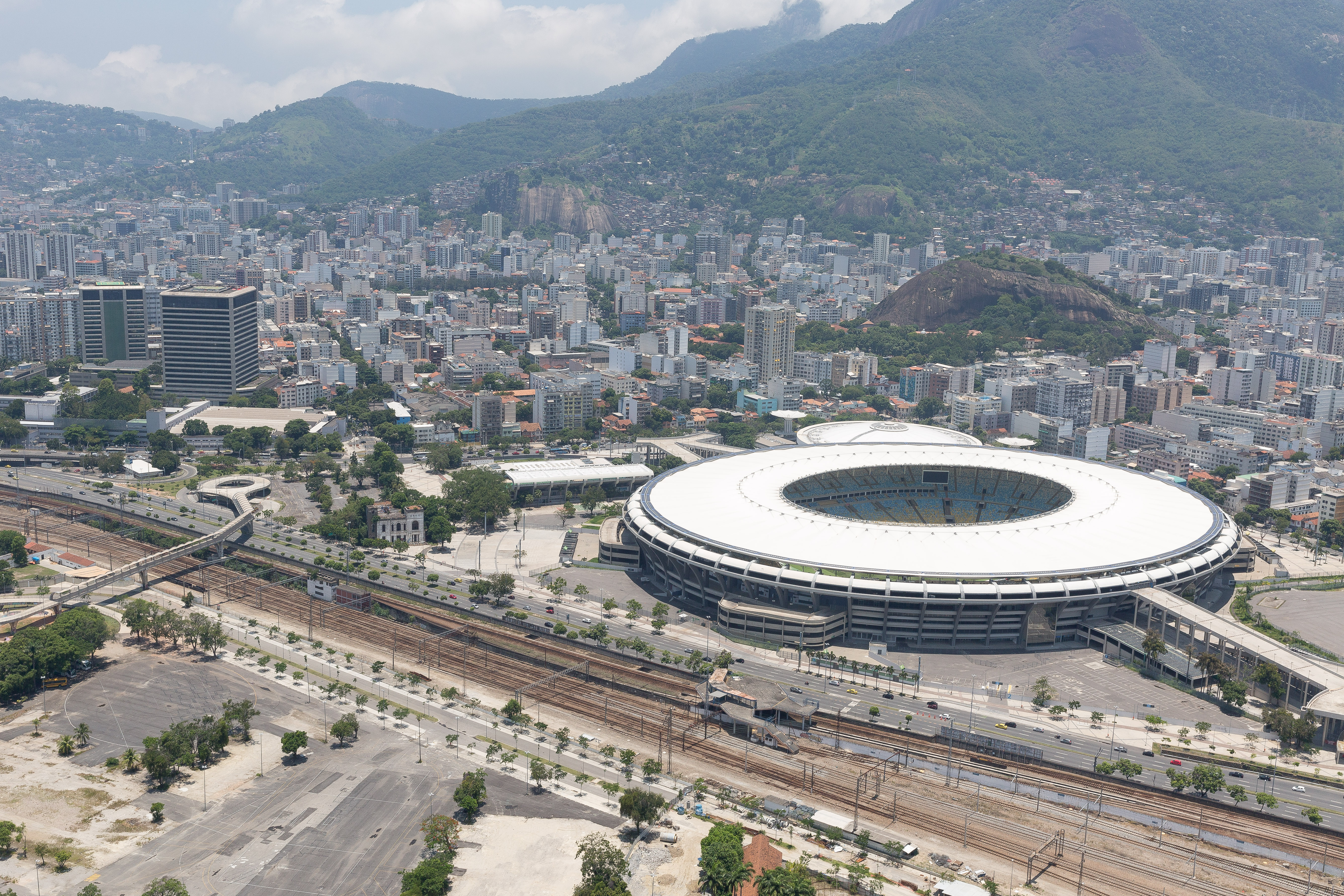 Vista aérea do estádio Maracanã, localizado na cidade do Rio de Janeiro.